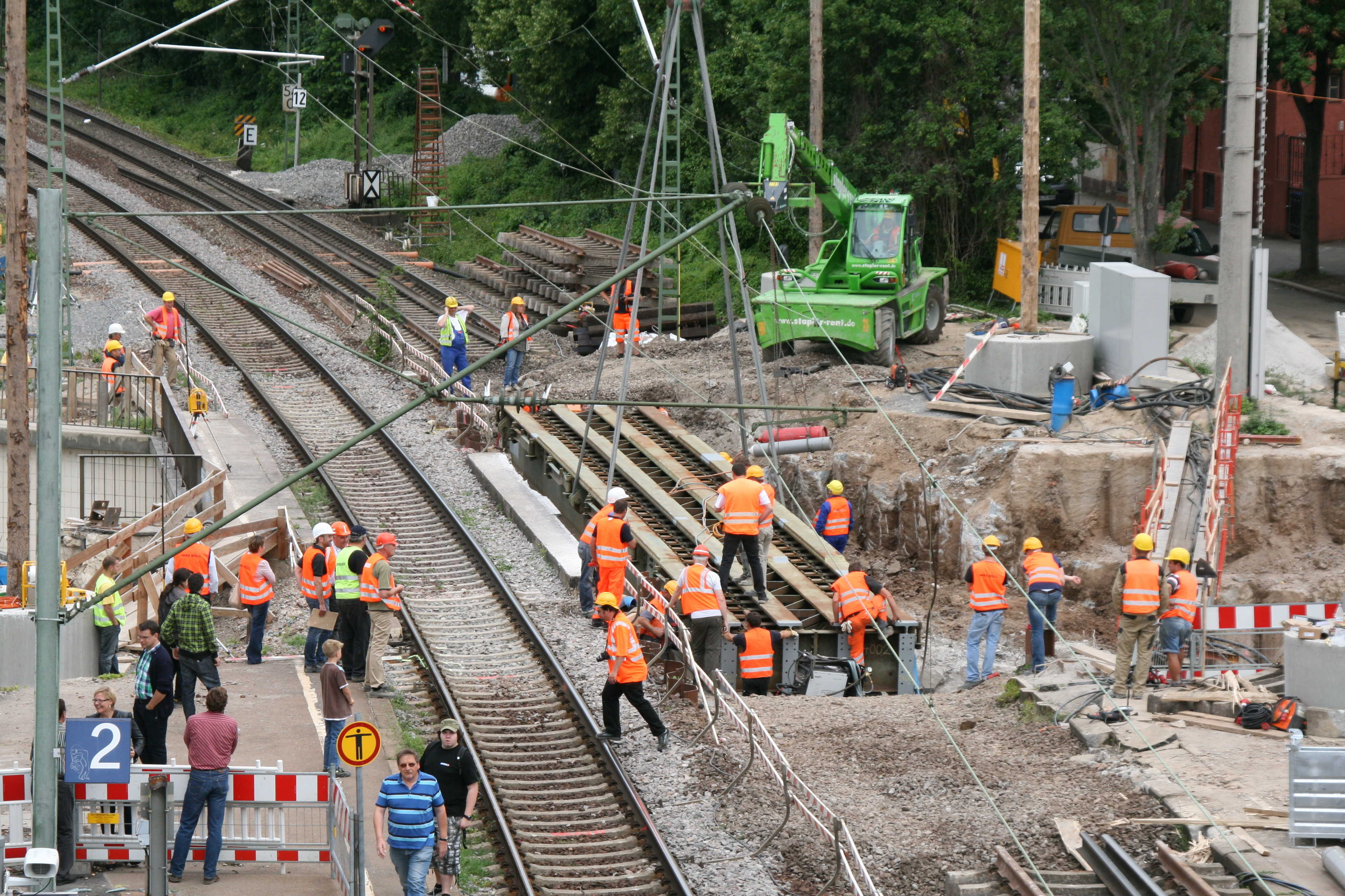 Einsetzung einer Hilfsbrücke bei der Großbaustelle Unterführung Sülmertor des Bauvorhabens Stadtbahn Nord in Heilbronn